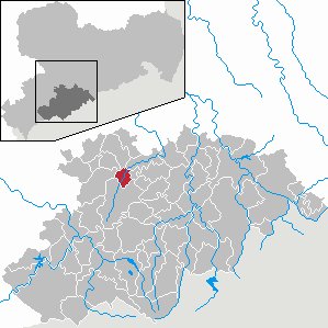 Thalheim/Erzgeb. im Erzgebirgskreis, Sachsen